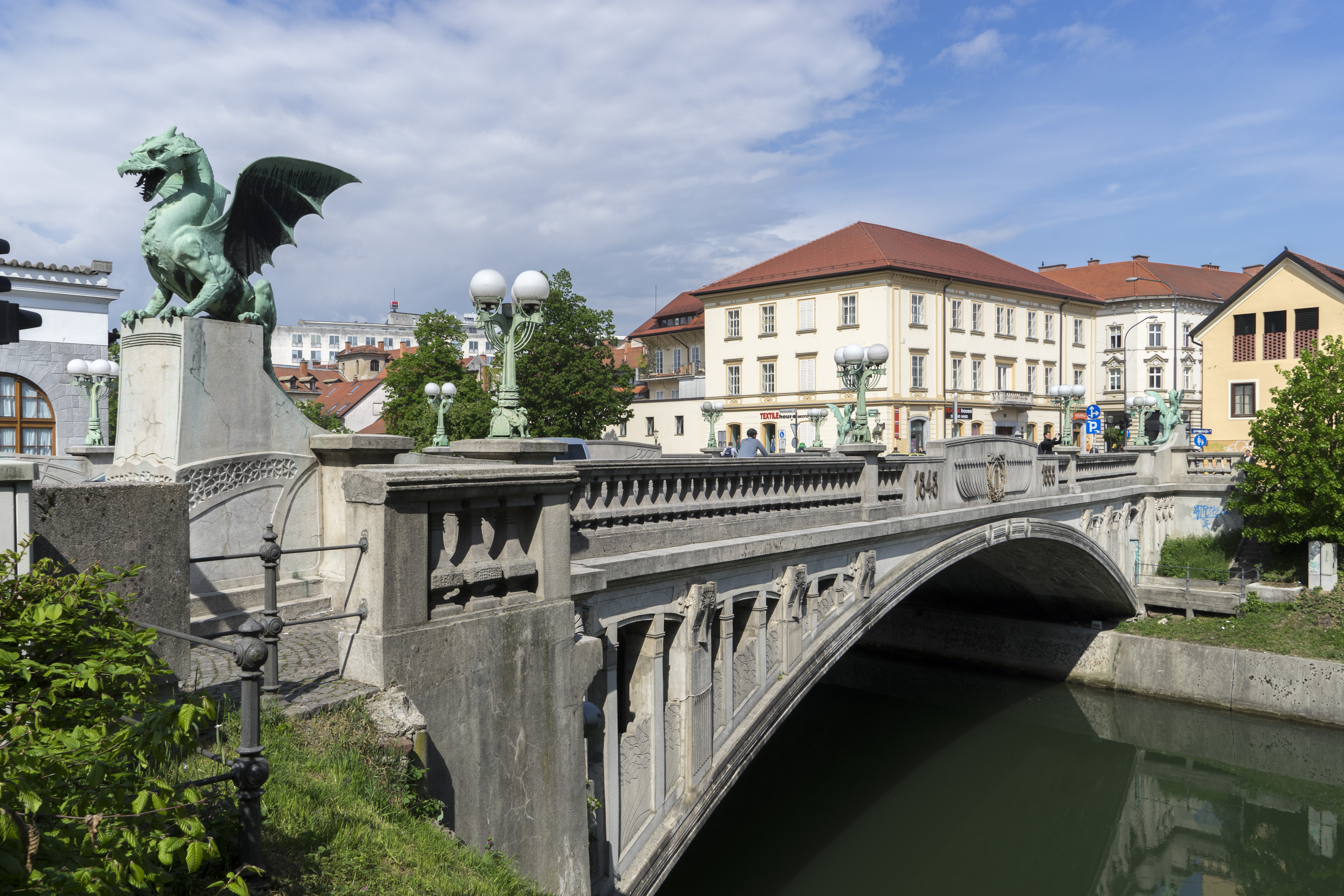 The Dragon Bridge is one of the main sights of Ljubljana, Slovenia.